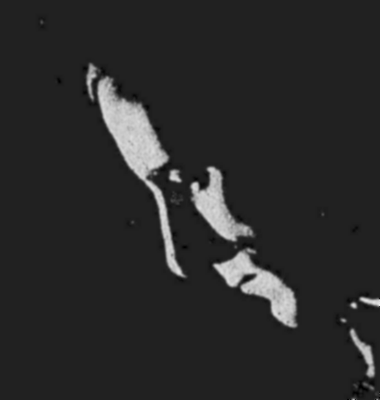 Cantor brasileiro Francisco Alves.